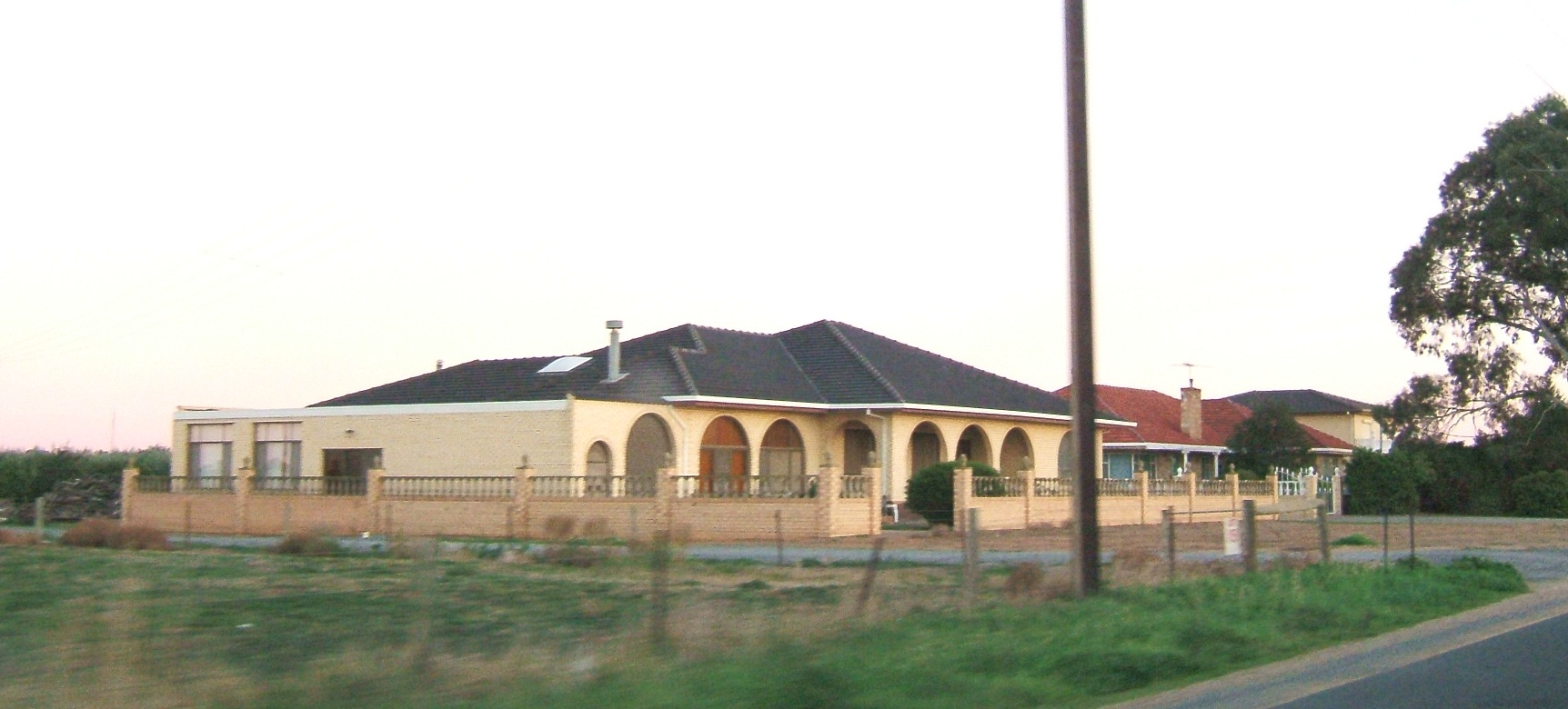 Waterloo Corner, Adelaide